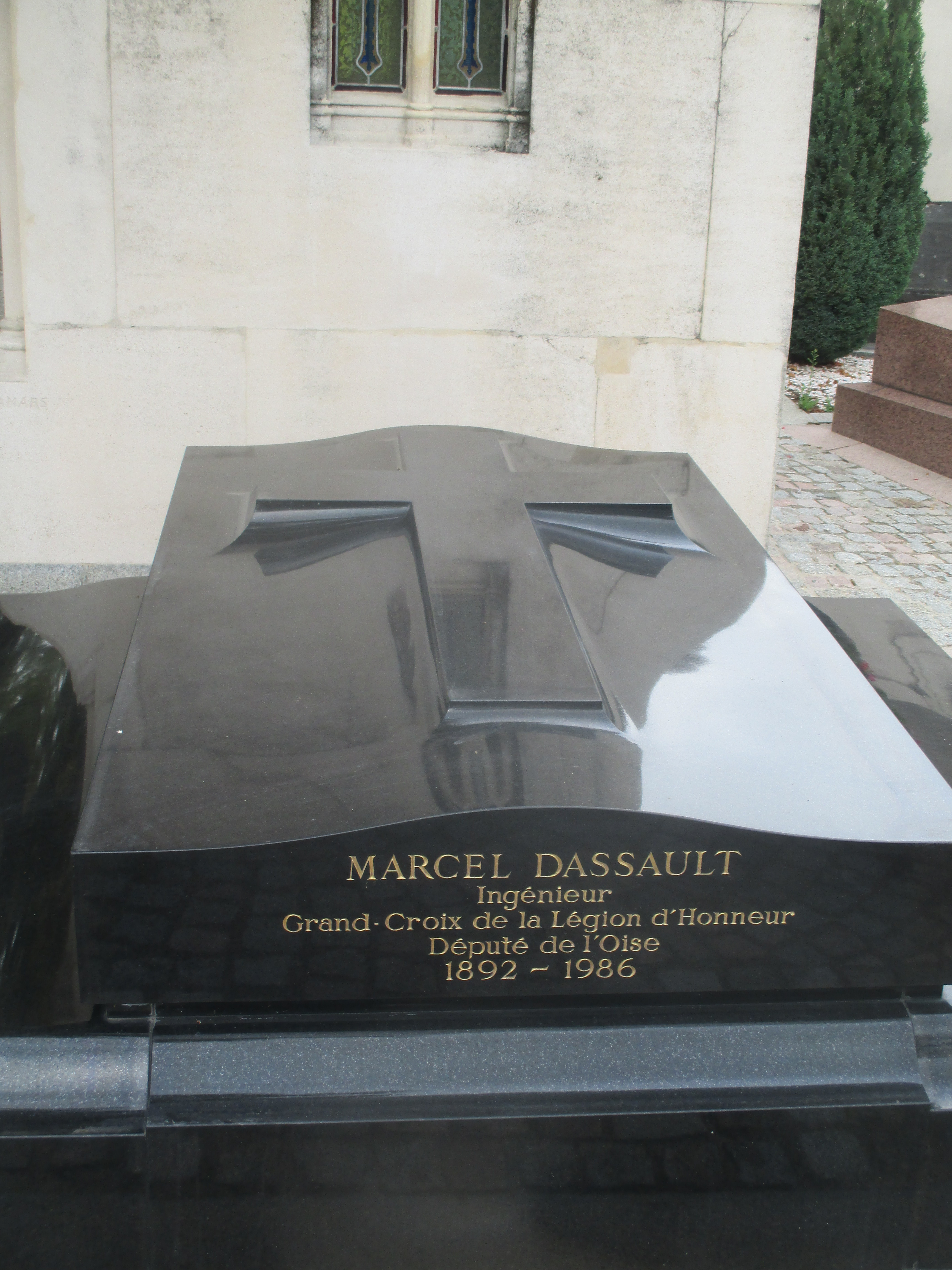 Tombe Dassault au cimetière de Passy.